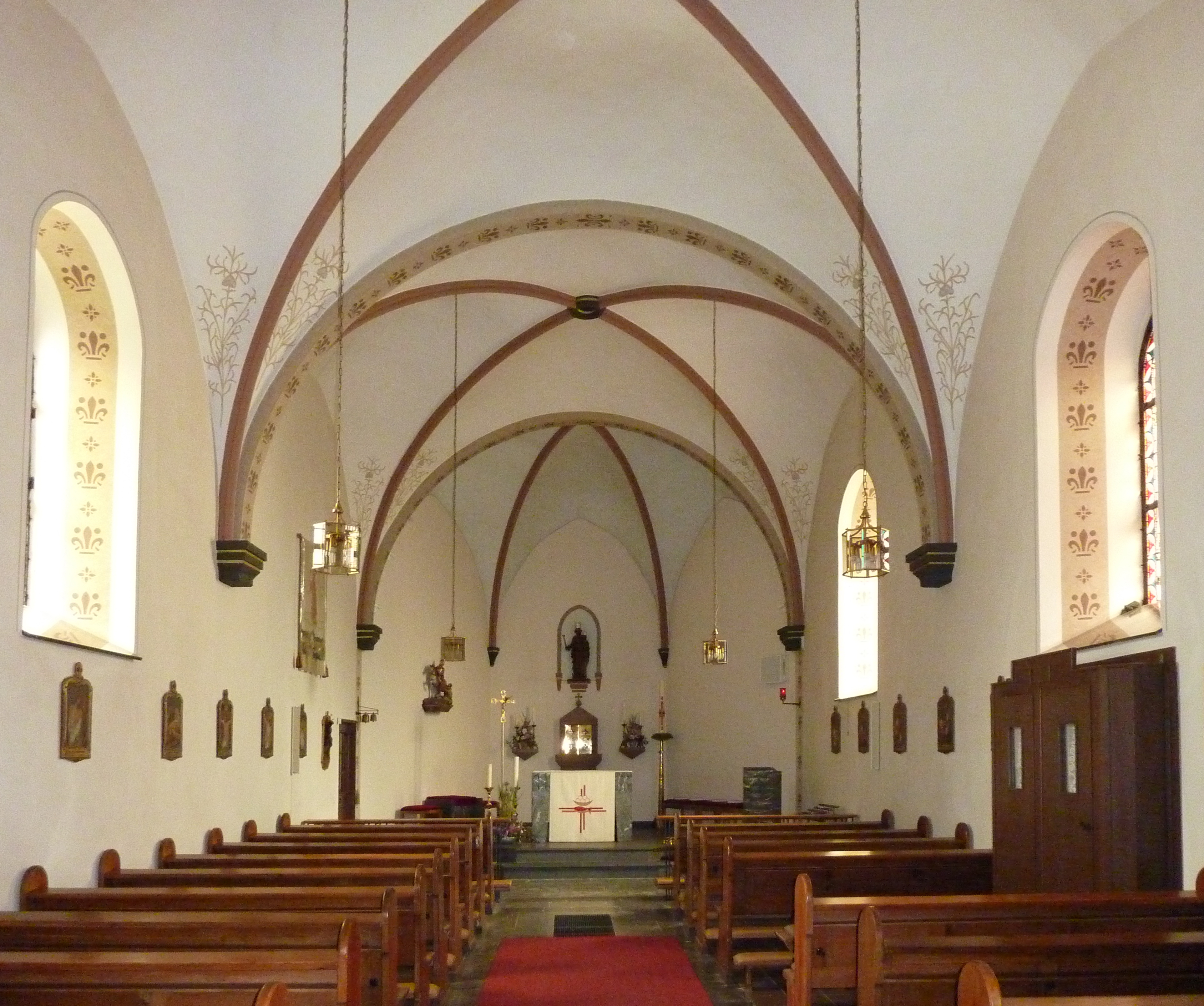 Freilingen, Marienplatz 1, kath. Kapelle St. Martin, innen nach O